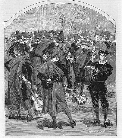 L'Estudiantina Espagnola qui triompha au Carnaval de Paris en 1878.